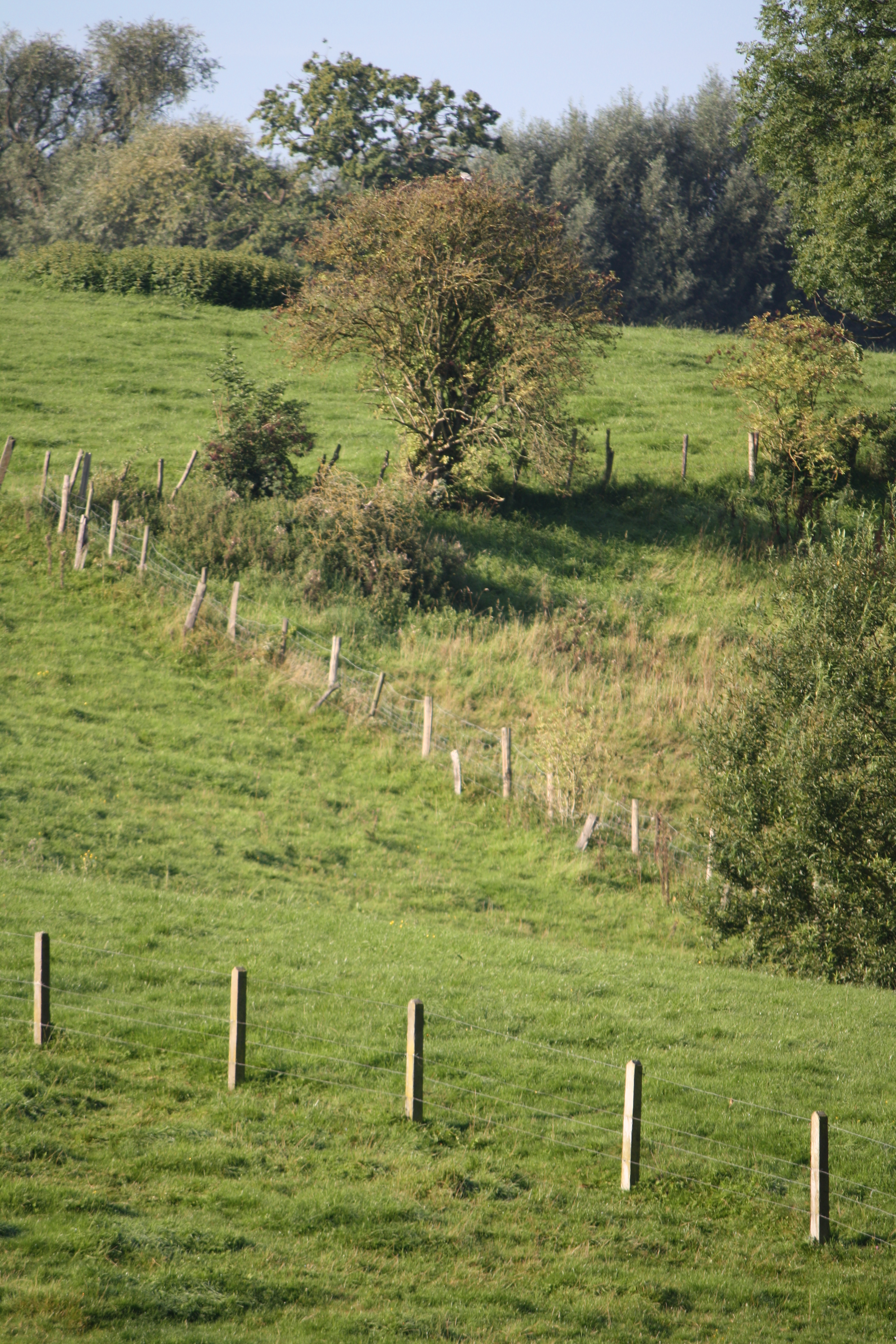 Burreken